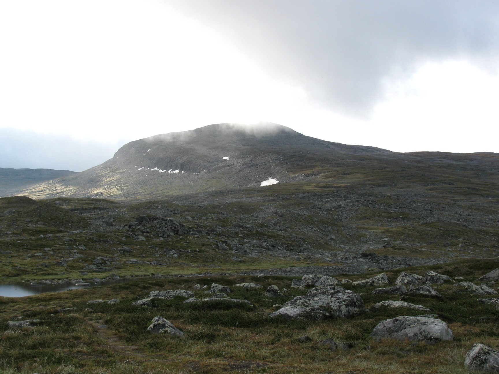 Loassonibba aamulla sadepilvien väistyessä